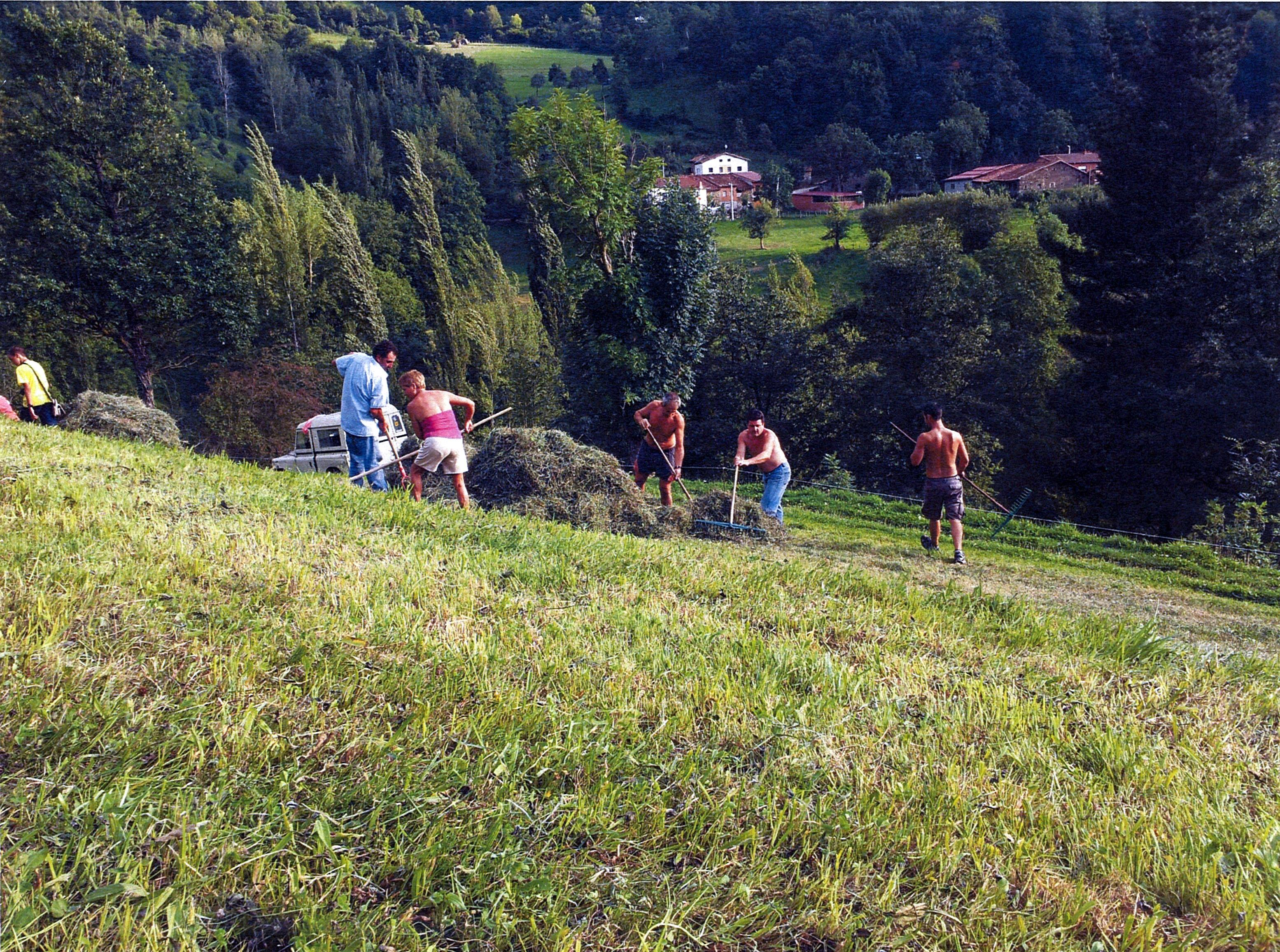 Tareas de campo en el barrio de Arriba de Bárago (Cantabria, España)